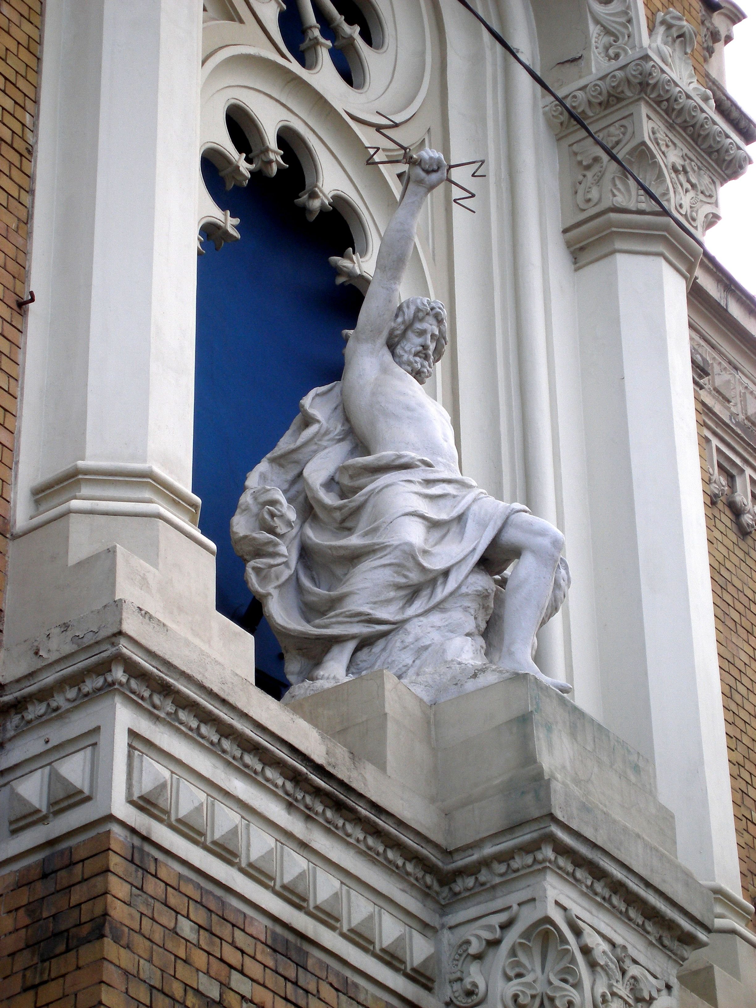 Alegoriska Zeva figūra VEF galvenās montāžas halles fasādē, Rīgā, Brīvības ielā.